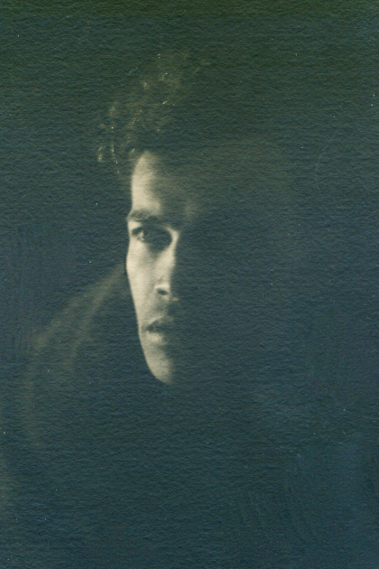 Foto di mia proprietà del 1906